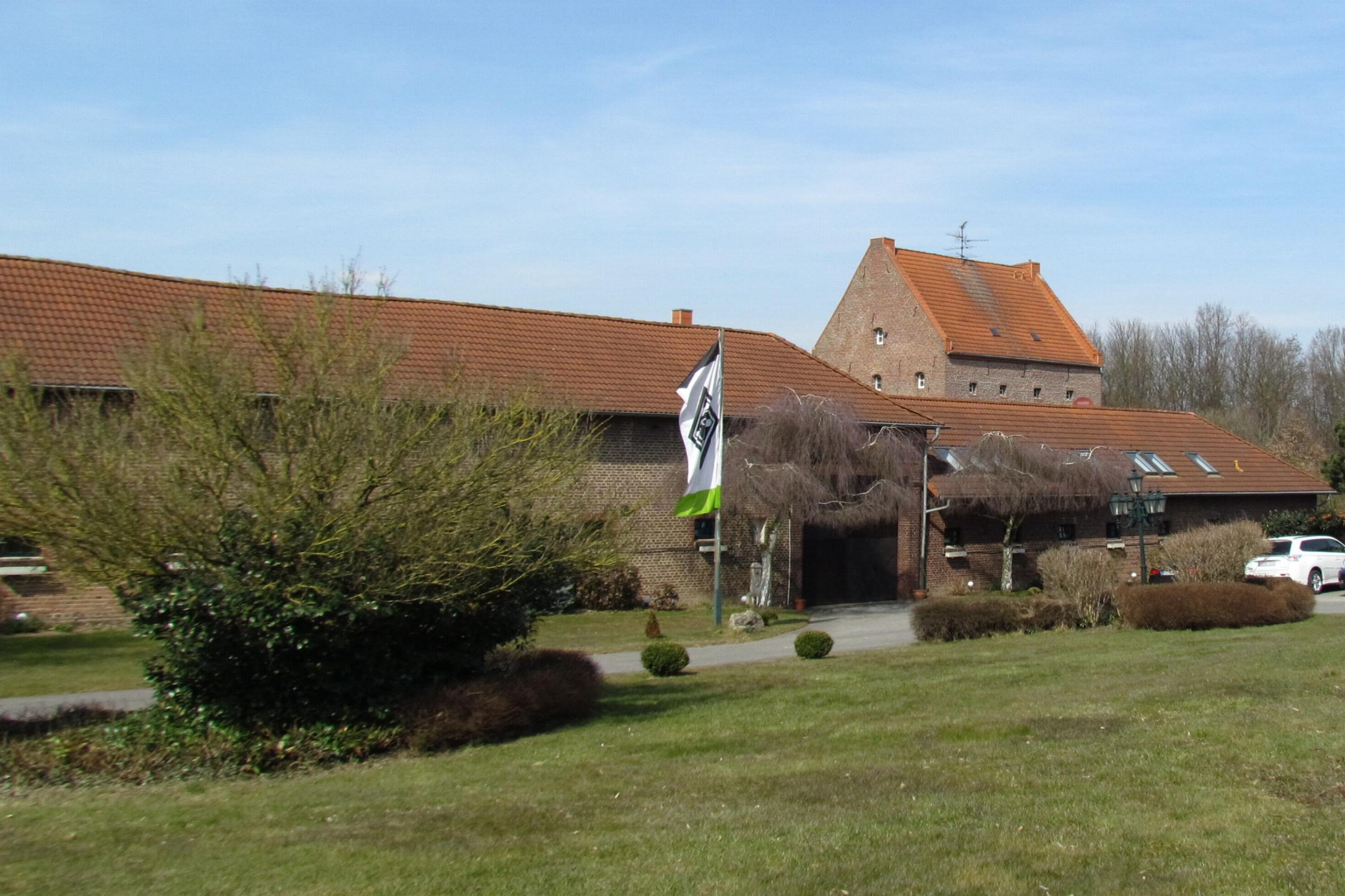 Wassermühle in der Stadt Mönchengladbach